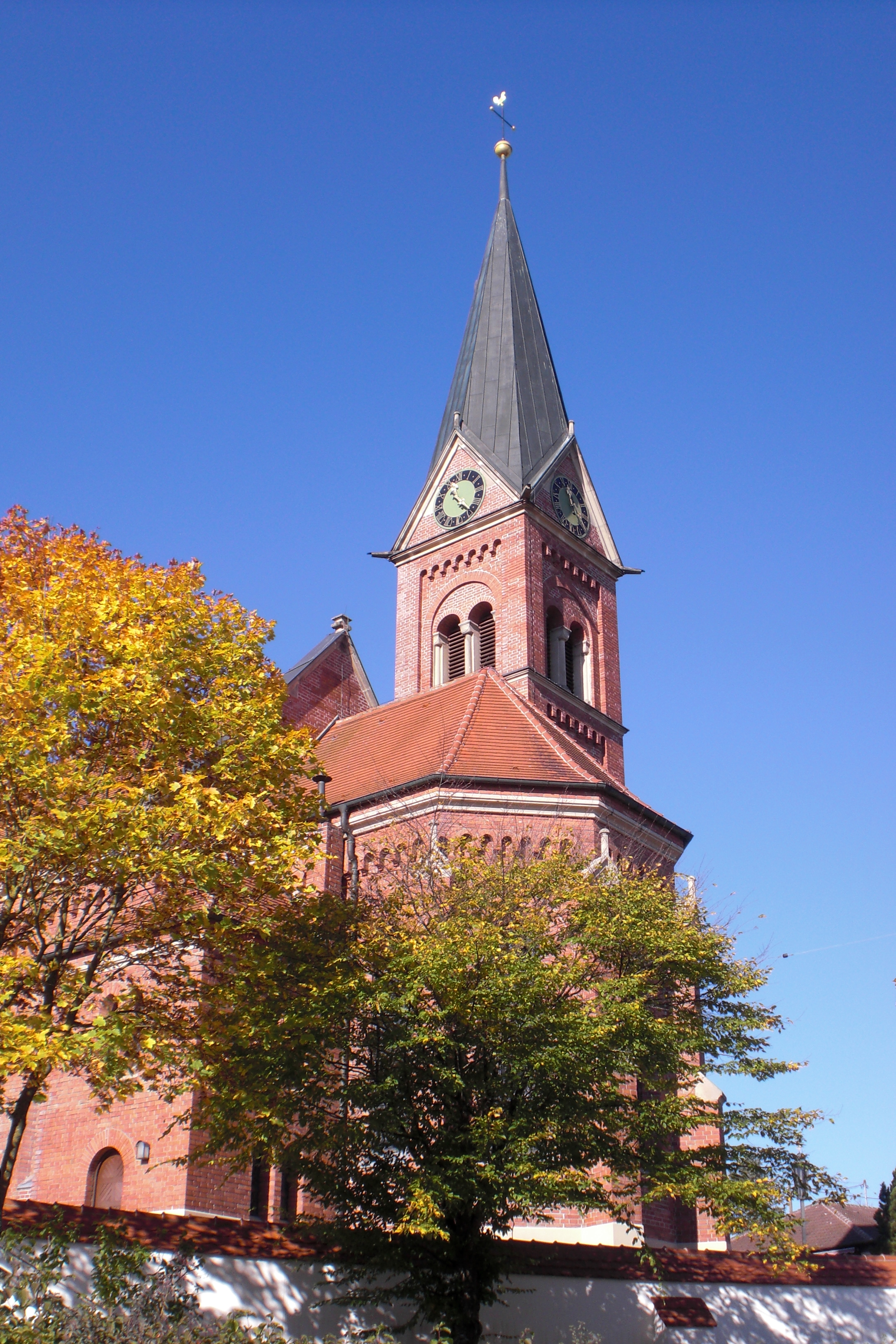 Katholische Pfarrkirche St. Gordianus und Epimachus in Winterbach Landkreis Günzburg, Bayern